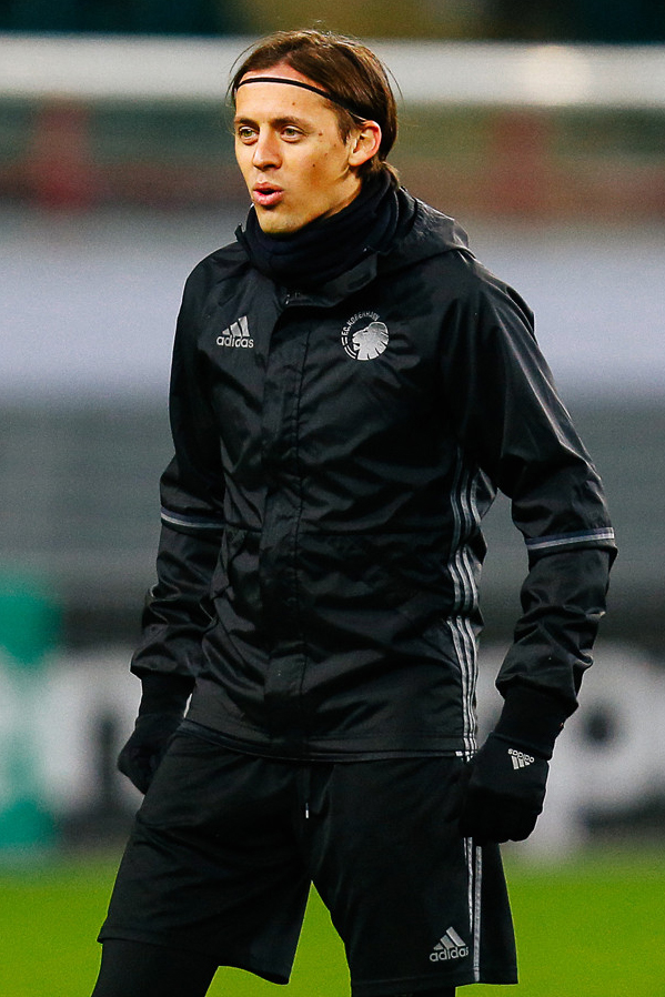 «Копенгаген» опробовал поле «РЖД Арены»